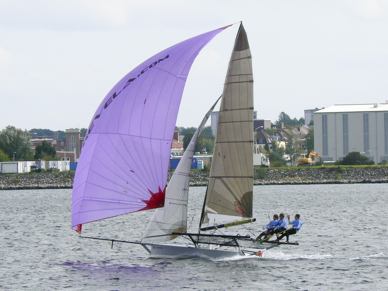 Ein 18 foot Skiff im Kieler Hafen.